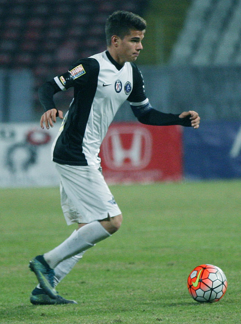 Ianis Hagi meci